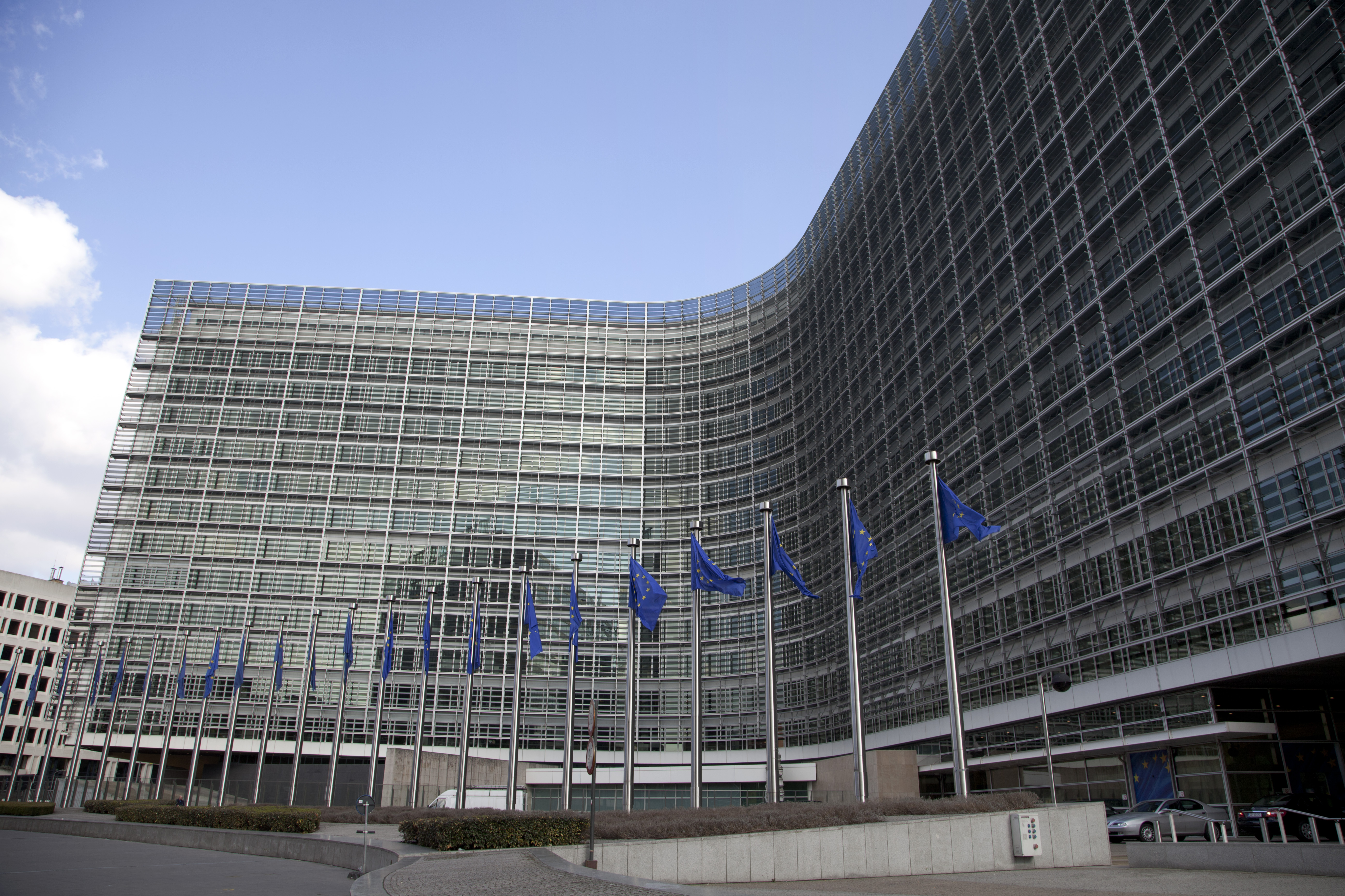 Bruselas (Bélgica), 19 de Marzo 2012. En el Edificio Berlamont, de la Comisión Europea, el Canciller Ricardo Patiño se reunión con la Vicepresidenta de la Comisión Europea y Alta Representante para la Política Exterior y de Seguridad de la Unión Europea, Catherine Ashton.